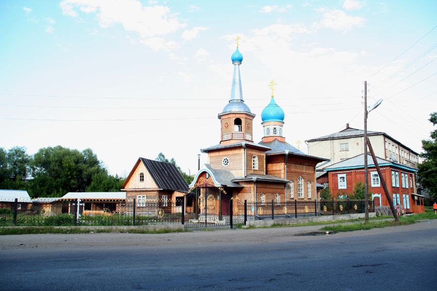 Pravoslavný kostel v Gorno-Altajsku (datum: srpen 2006, autor: Vít Hněvkovský) Orthodox church in Gorno-Altaysk (date: August 2006, author: Vít Hněvkovský, CZ)